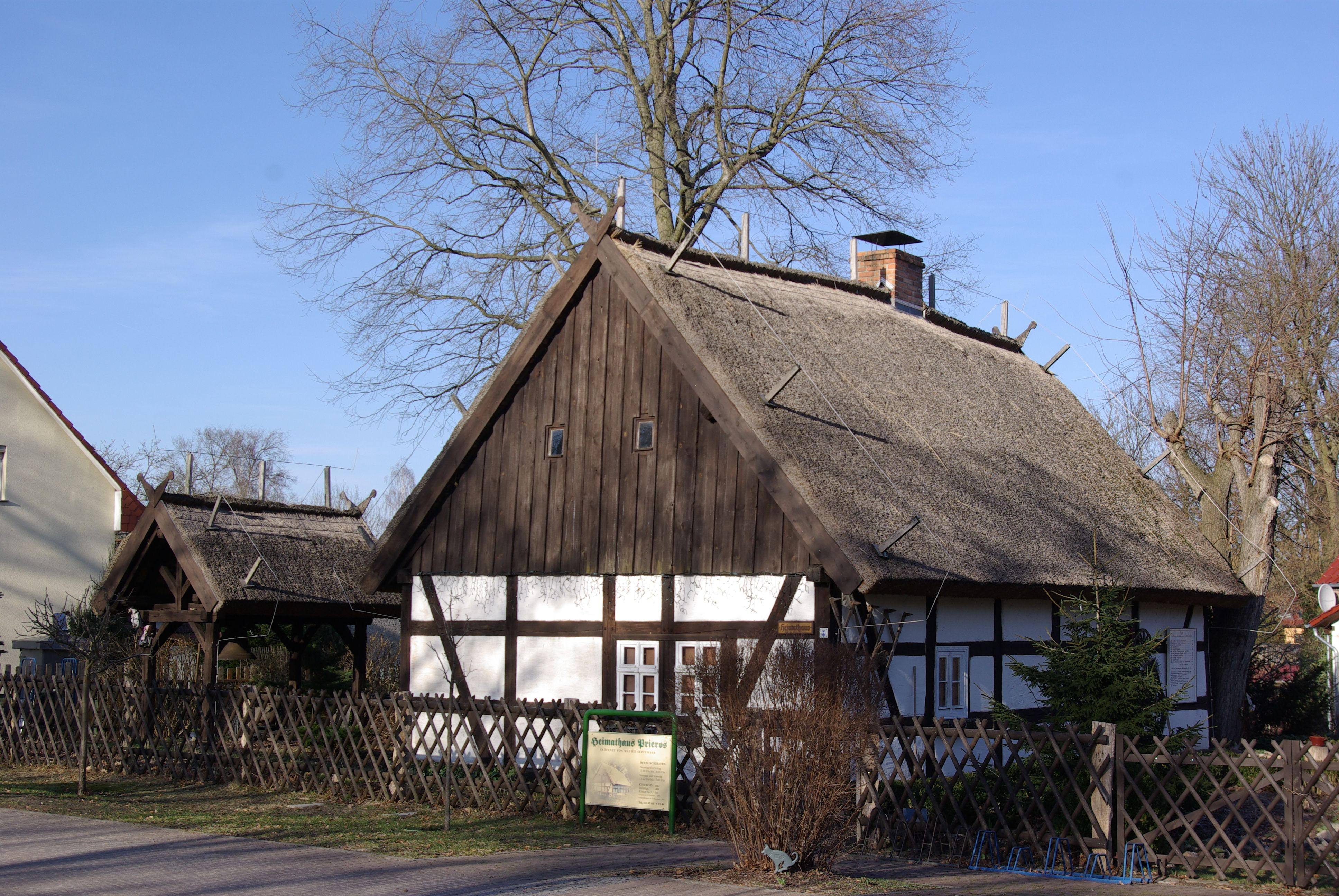 Prieros in Heidensee in Brandenburg. Das Fachwerkhaus steht am Dorfanger und beinhaltet das Heimatmuseum. Das Haus steht unter Denkmalschutz.